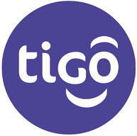 Tigo-Logo (Mobilfunkdienst)